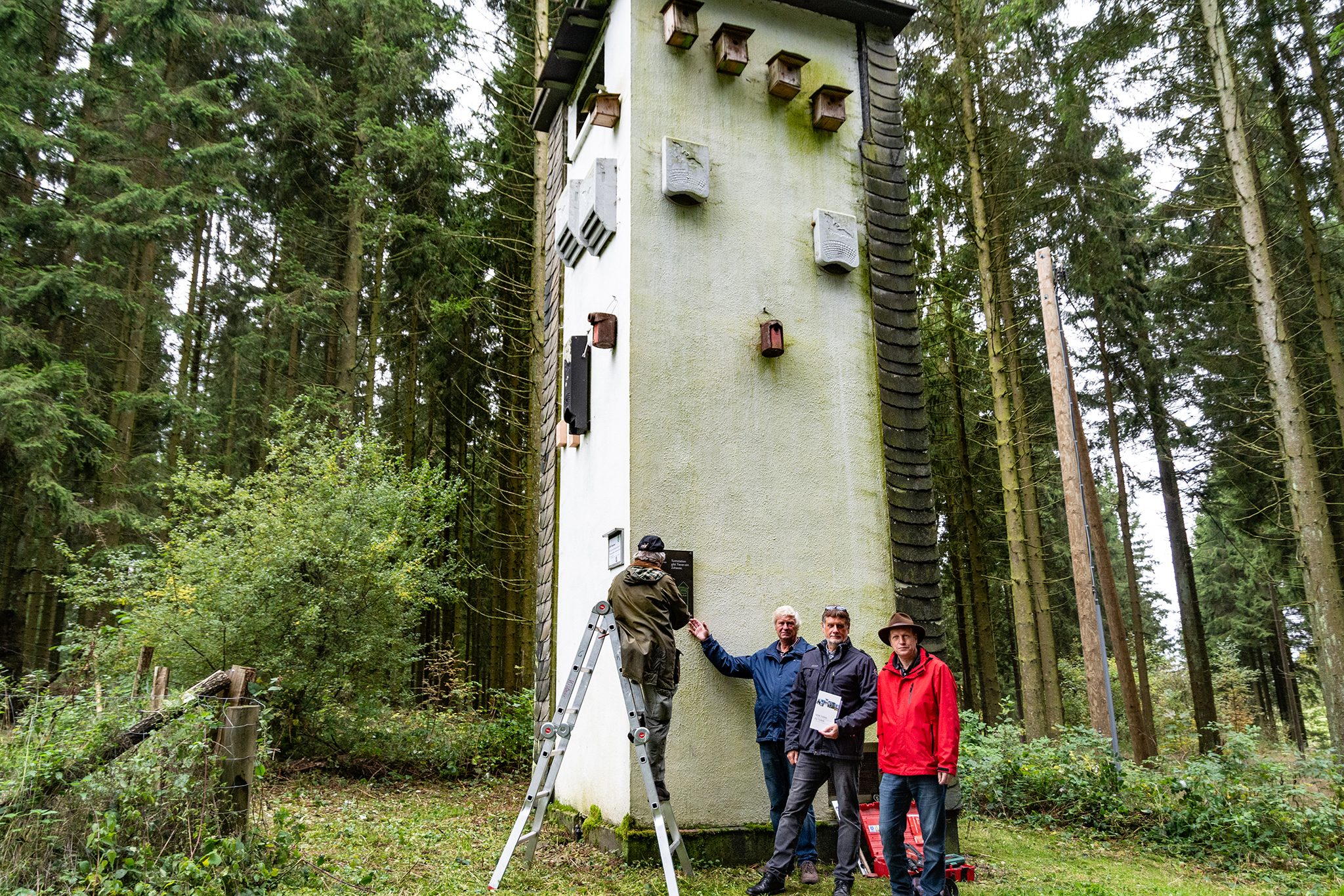 Offizielle Übergabe des Trafoturms von Westnetz (Tochterfirma von innogy) an den Verein für Natur- und Vogelschutz im Hochsauerlandkreis (VNV). Auf Bild von links Gerd Kistner (Turmbetreuer VNV), Bernhard Koch Vorsitzender des VNV, Andreas Steffen von Westnetz und Martin Lindner (Turmbetreuer VNV).